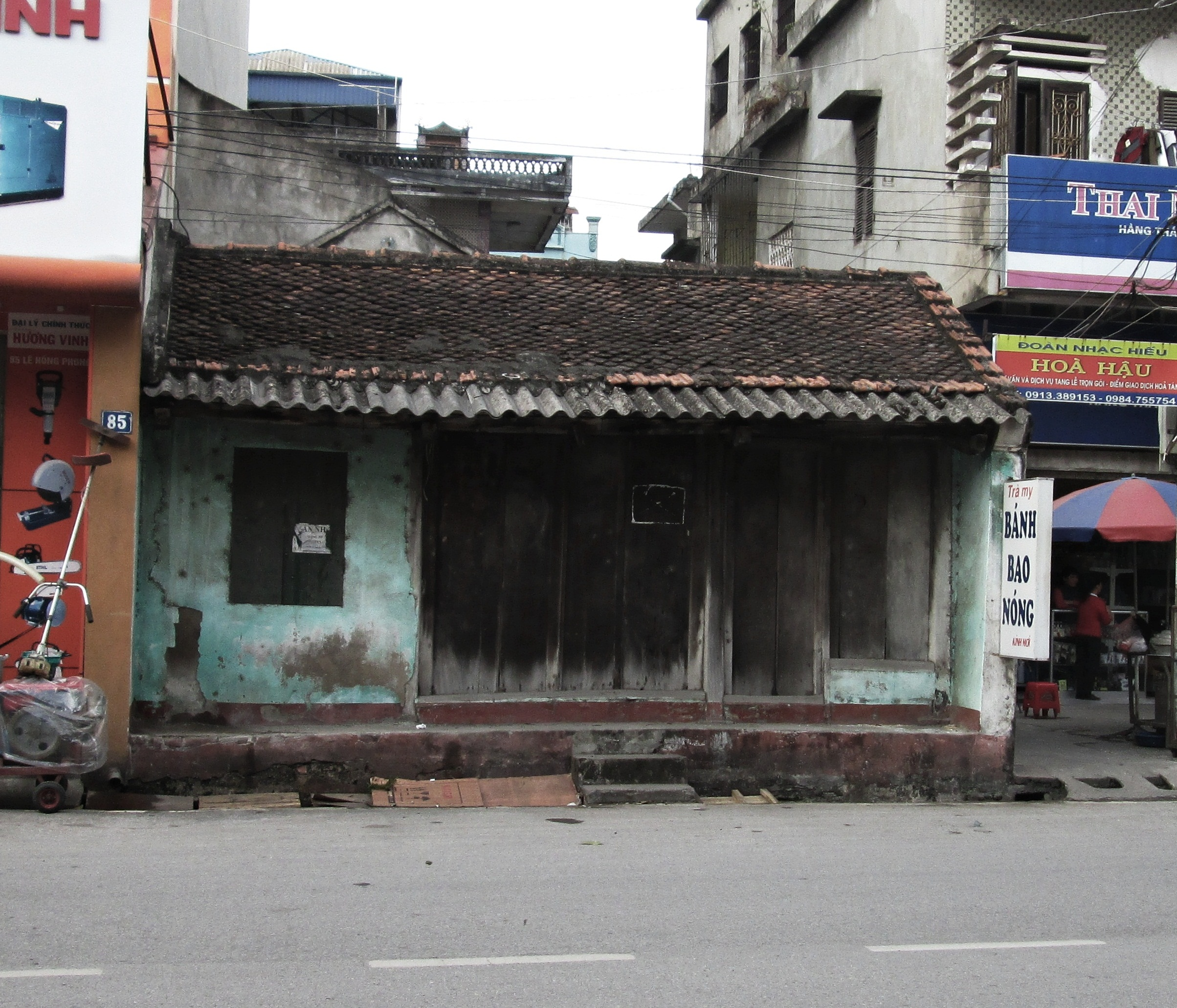 Ngôi nhà cổ mang phong cách Việt ở số 87 đường Lê Hồng Phong, thành phố Nam Định, tỉnh Nam Định.Xây dựng vào thời Nguyễn.